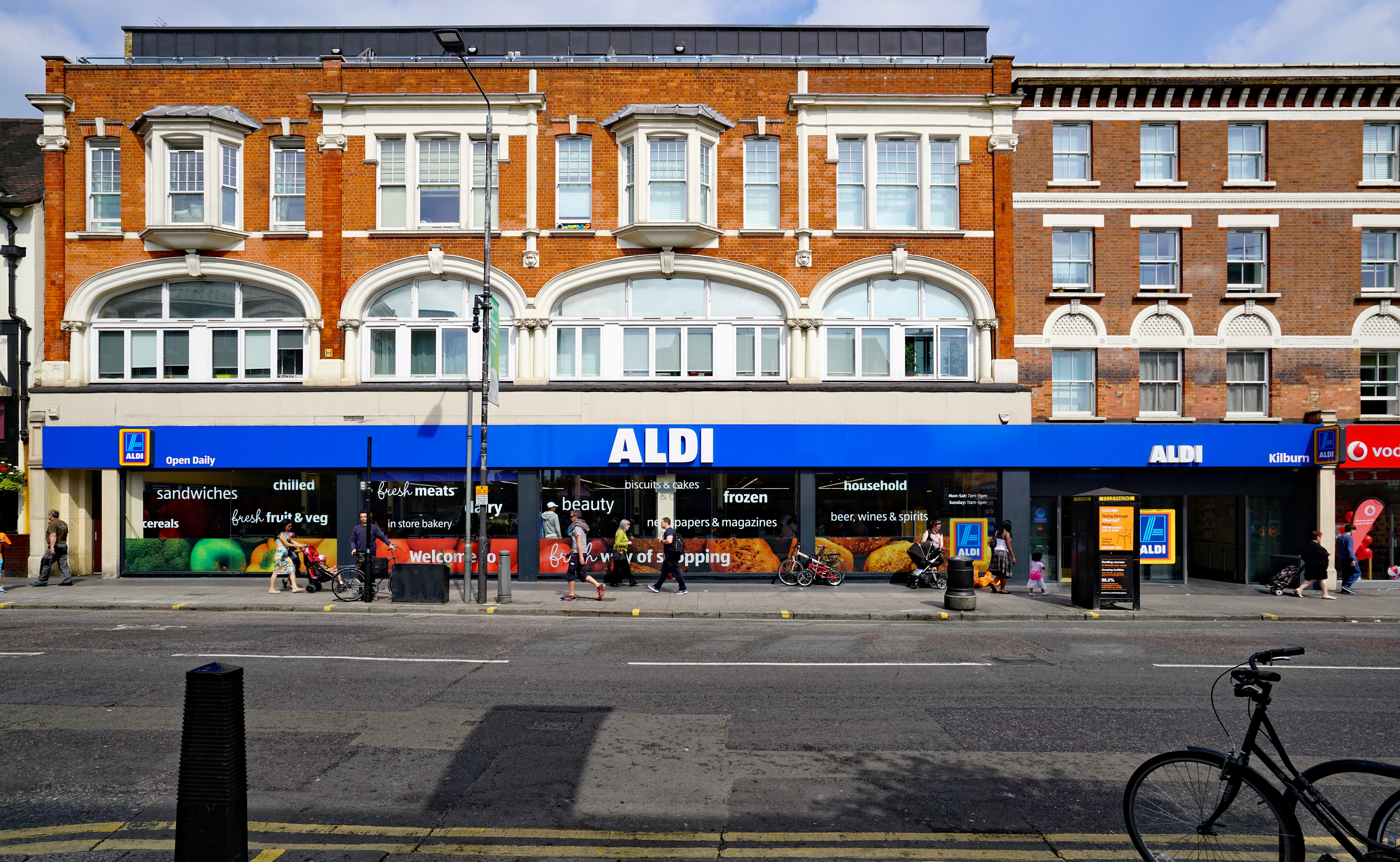 Eine Aldi-Filiale in London (Stadtteil: Kilburn im Stadtbezirk London Borough of Camden) an der Kilburn High Road im Vereinigten Königreich.